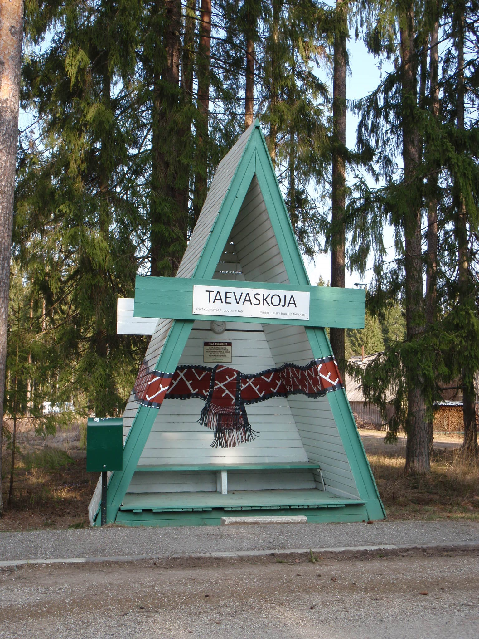 Taevaskoja bussipeatus